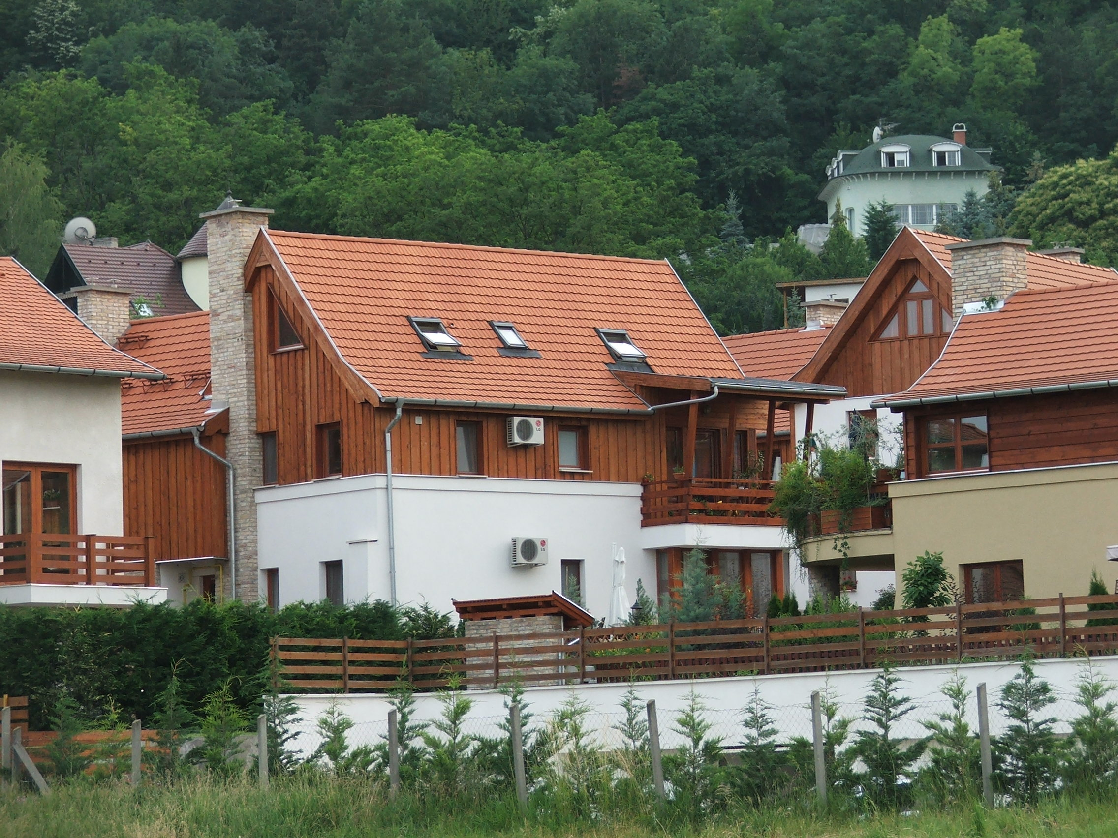 Békásmegyer. Az Ófalu új házai